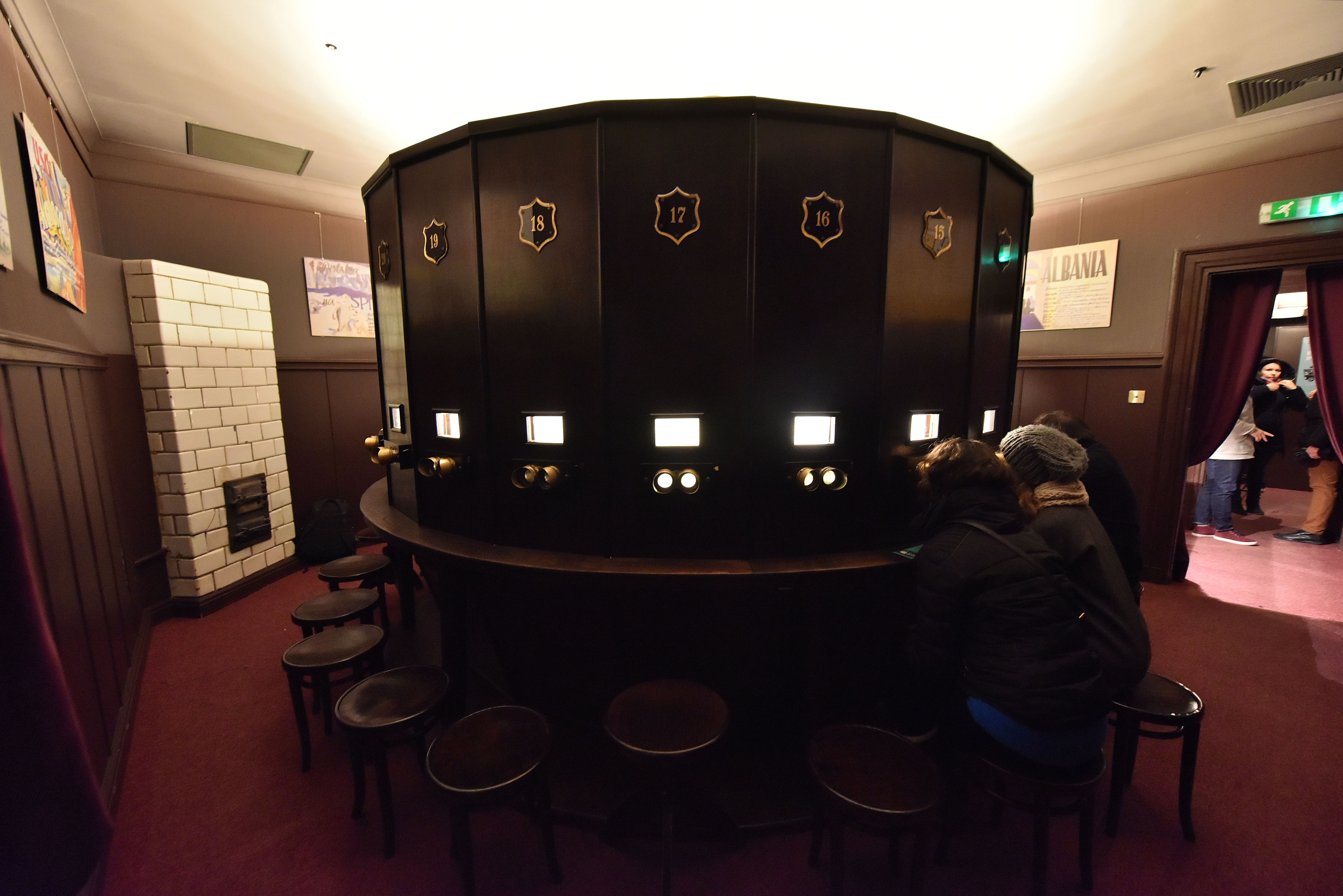 Fotoplastikon Warszawski